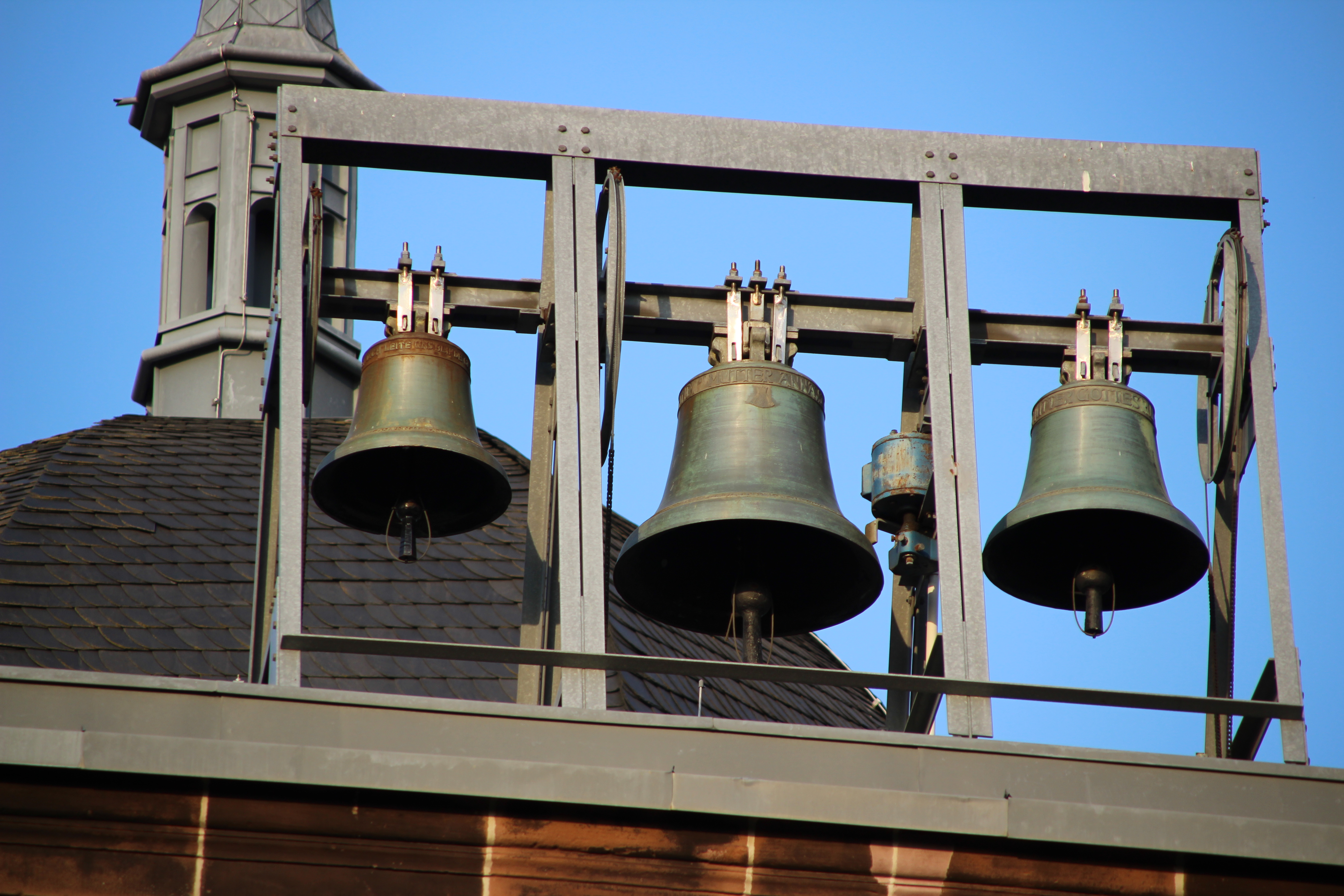 Bronze-Glocken der Herz-Jesu-Kirche der LVR-Klinik Düren, 1956 gegossen von der Fa. Feldmann & Marschel in Münster.